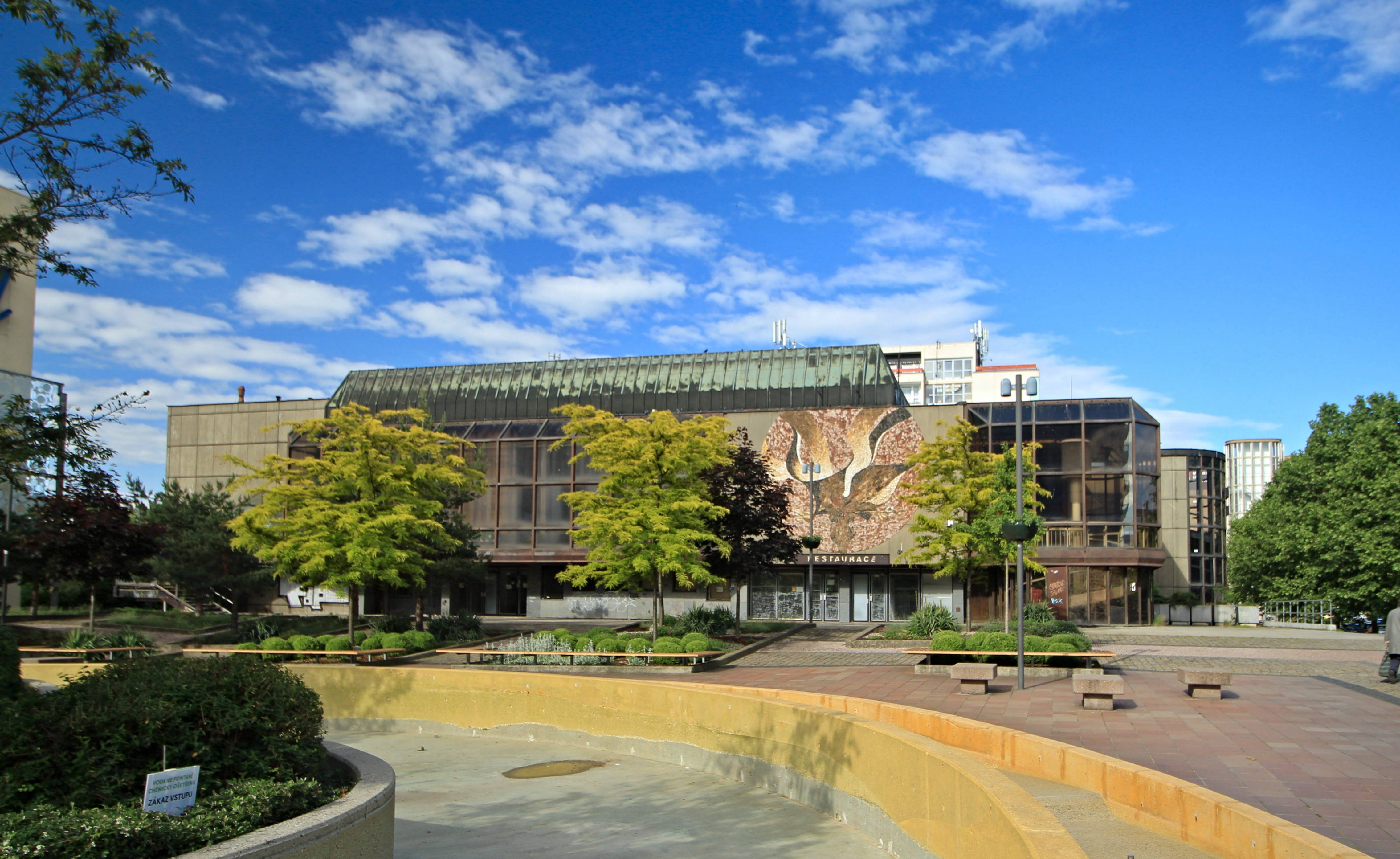 Vršovice - Kulturní dům Eden